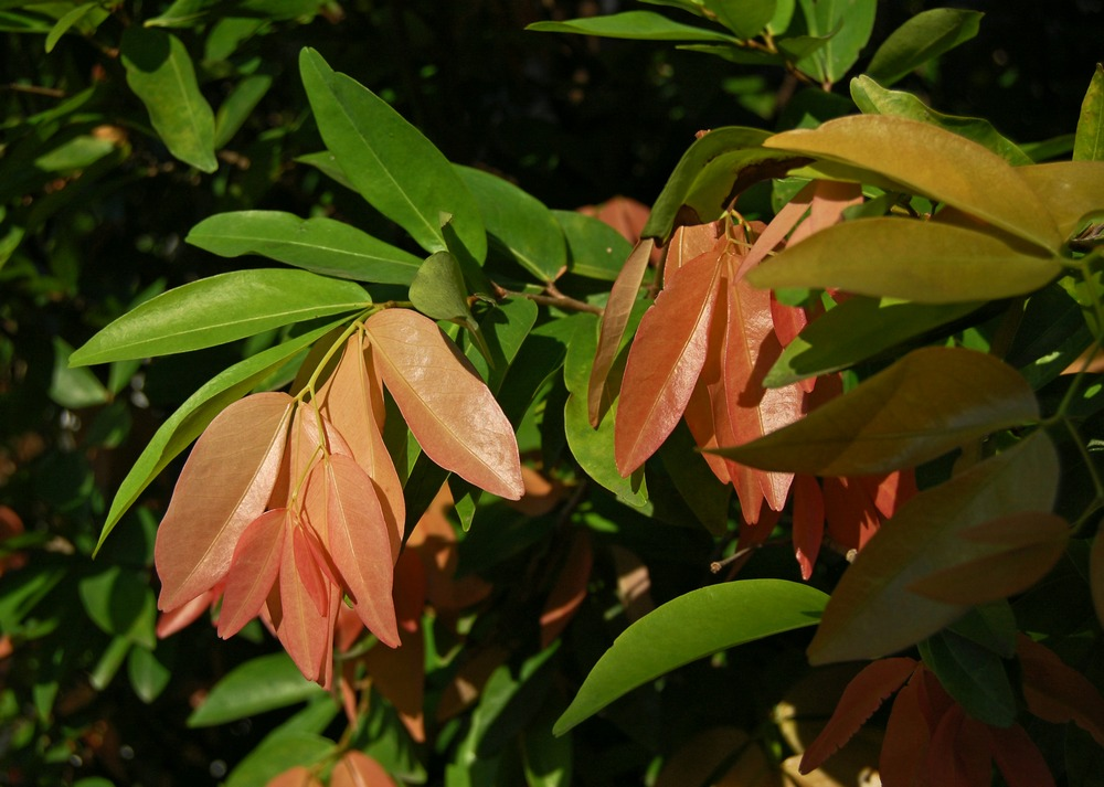 Cynometra cauliflora inflorescence. Bogor, West Java, Indonesia